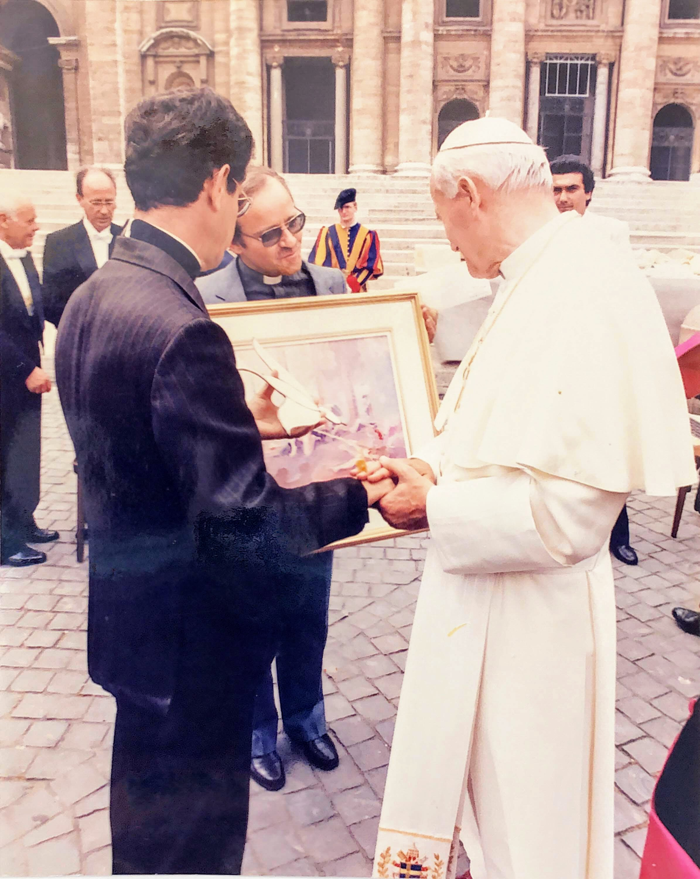 Lors de son passage au Canada en 1985, Jean-Paul II reçoit une toile de Luc Tanguay en souvenir de son passage.